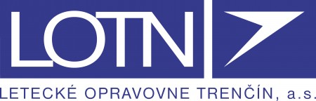 Oficialne logo LOTN